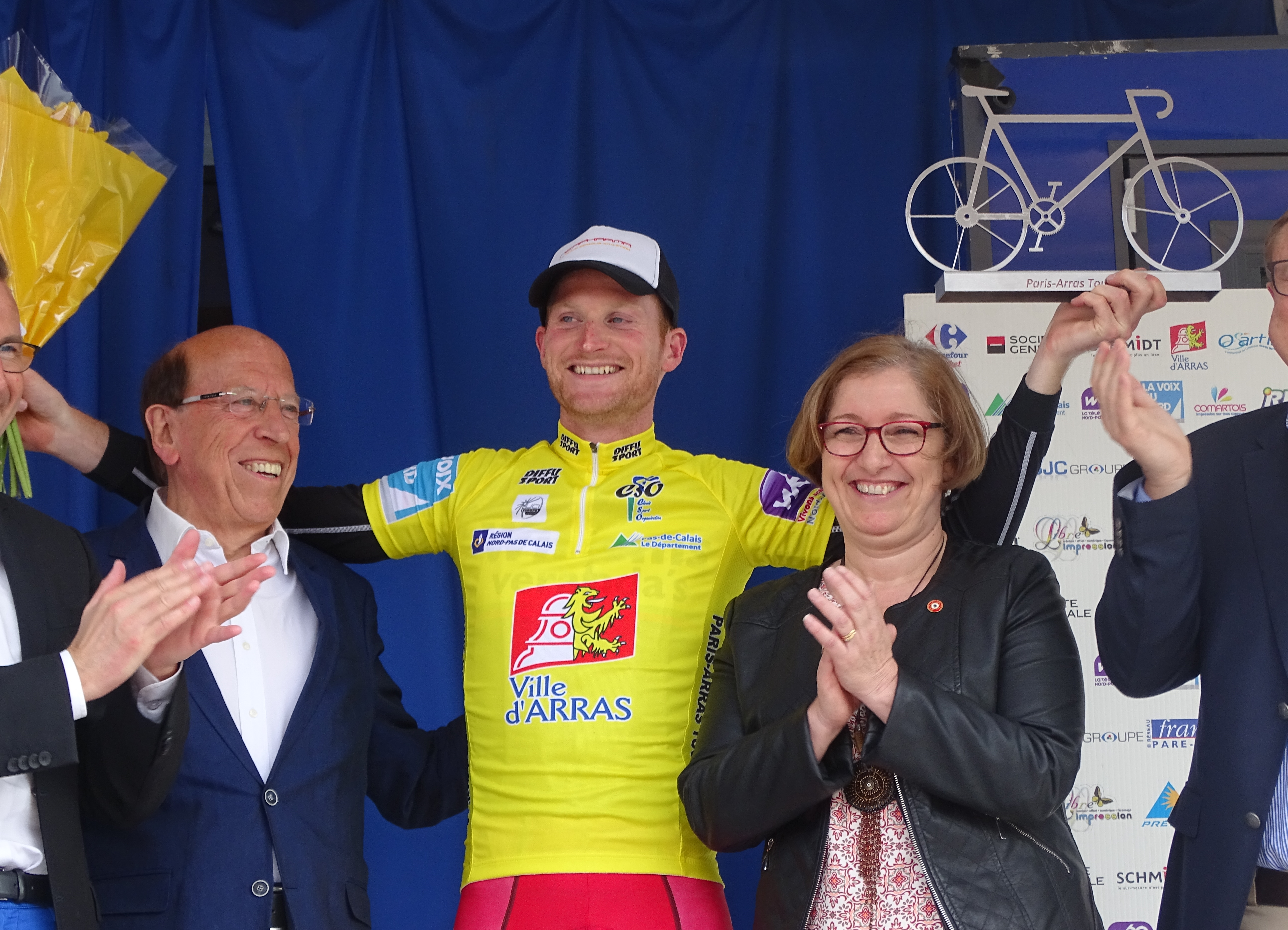 Reportage réalisé le dimanche 24 mai 2015 à l'occasion du départ et de l'arrivée de la troisième étape du Paris-Arras Tour 2015 à Arras, Pas-de-Calais, Nord-Pas-de-Calais, France.